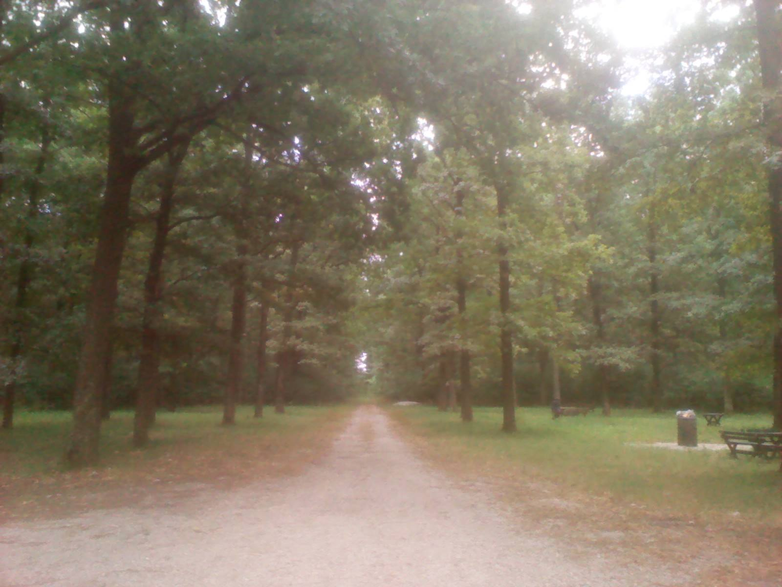 Srpski (latinica): Spomenik prirode Rogot